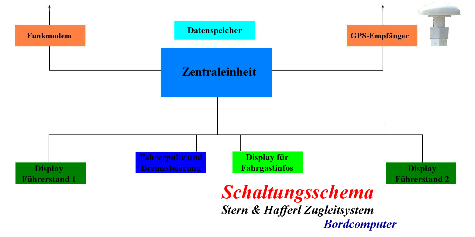 Schaltungsschema des Zugleitsystems - Bordcomputer